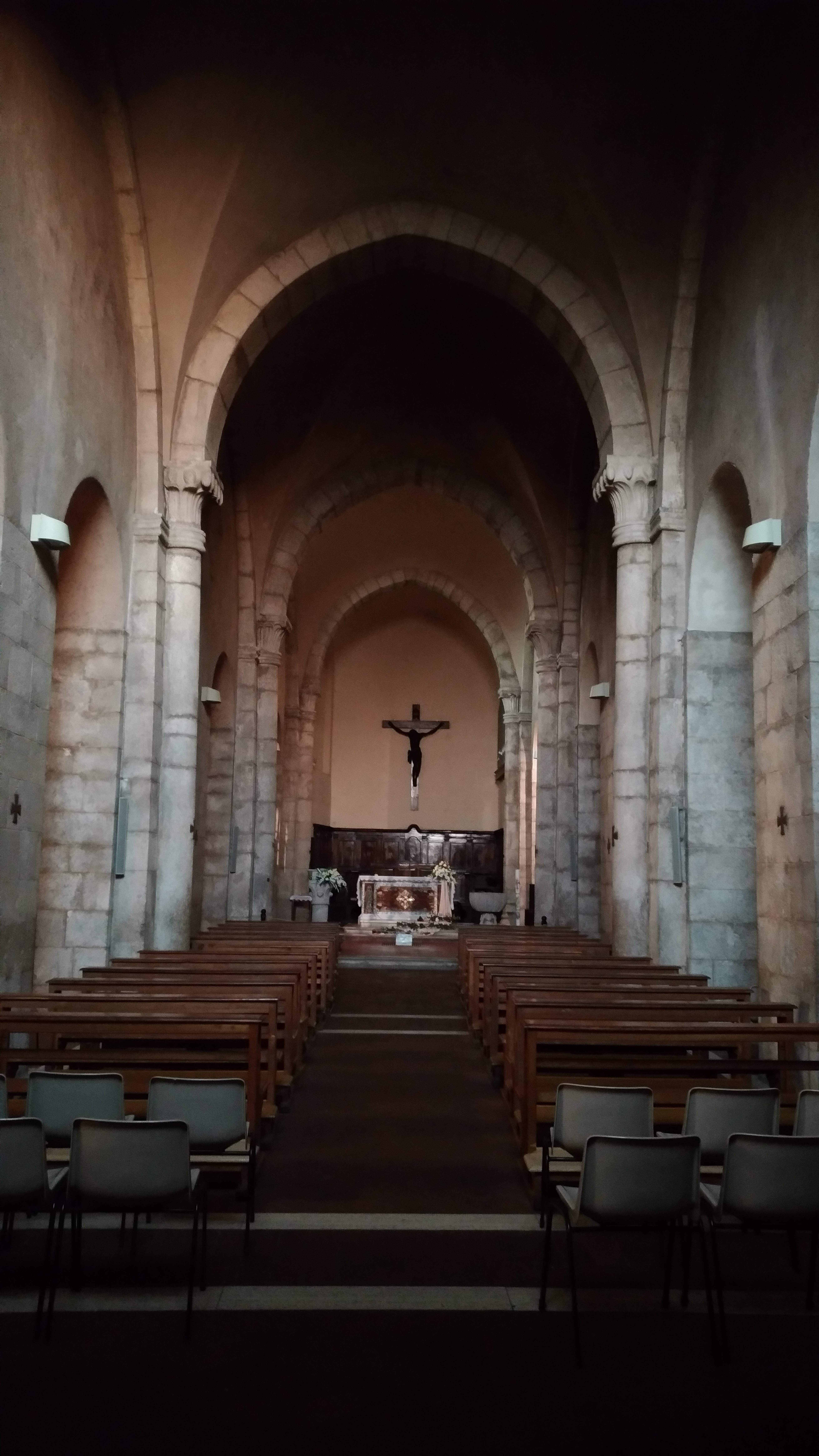 Collegiata di Santa Maria Maggiore (Alatri), interno